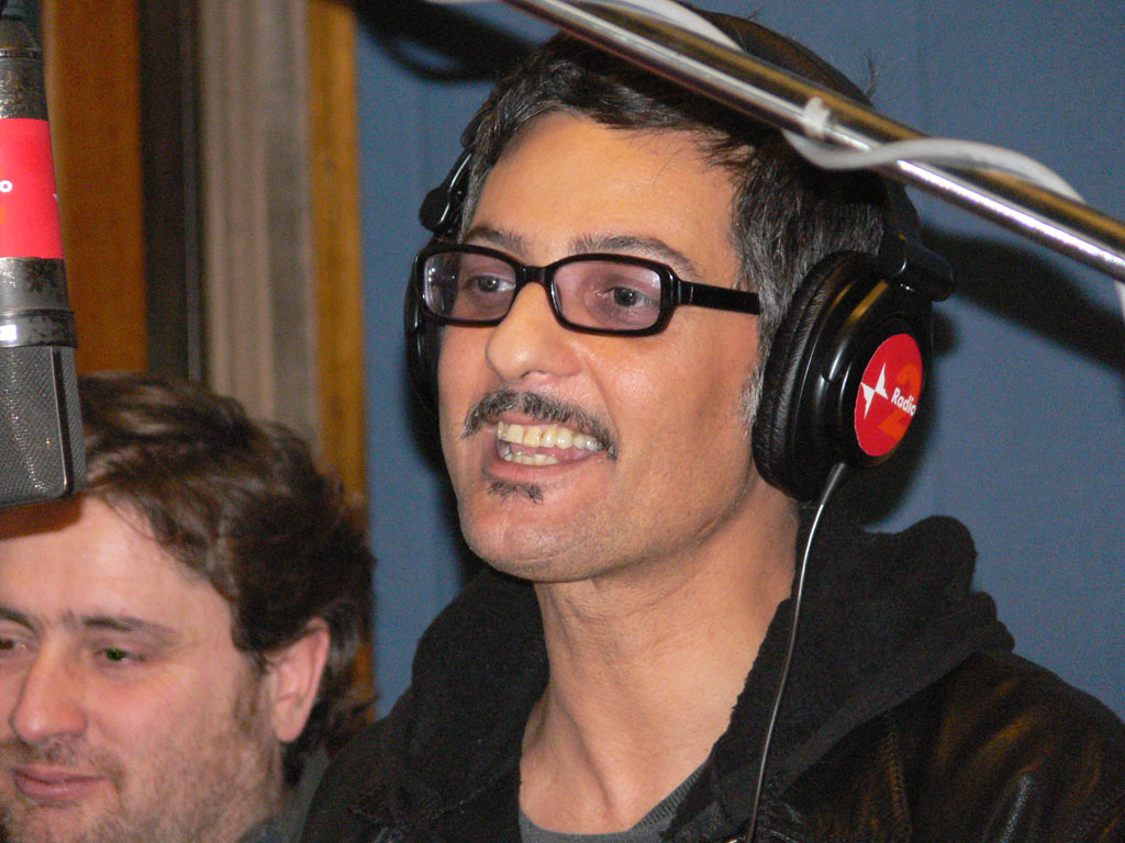 Rosario Fiorello